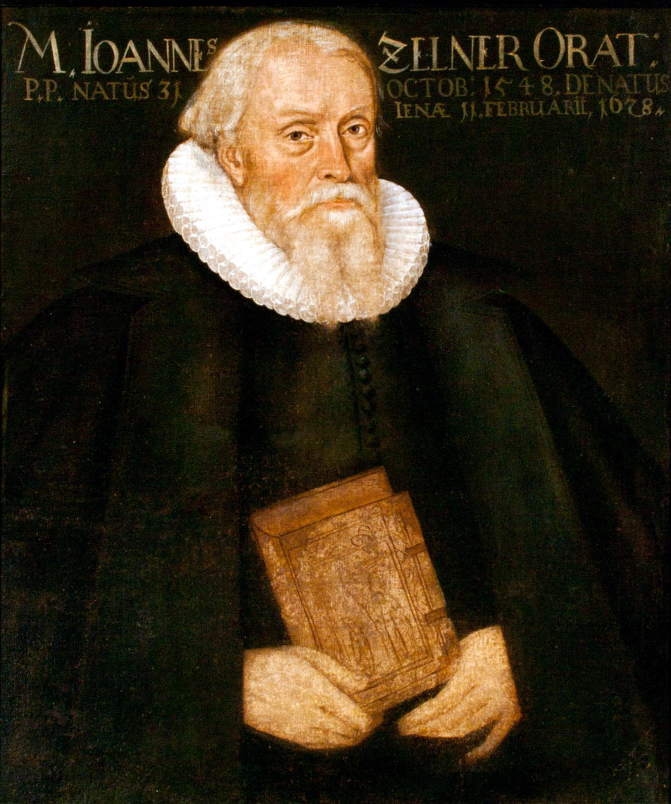 Johannes Zölner auch: Zelner (1548-1628) deutscher Rhetoriker